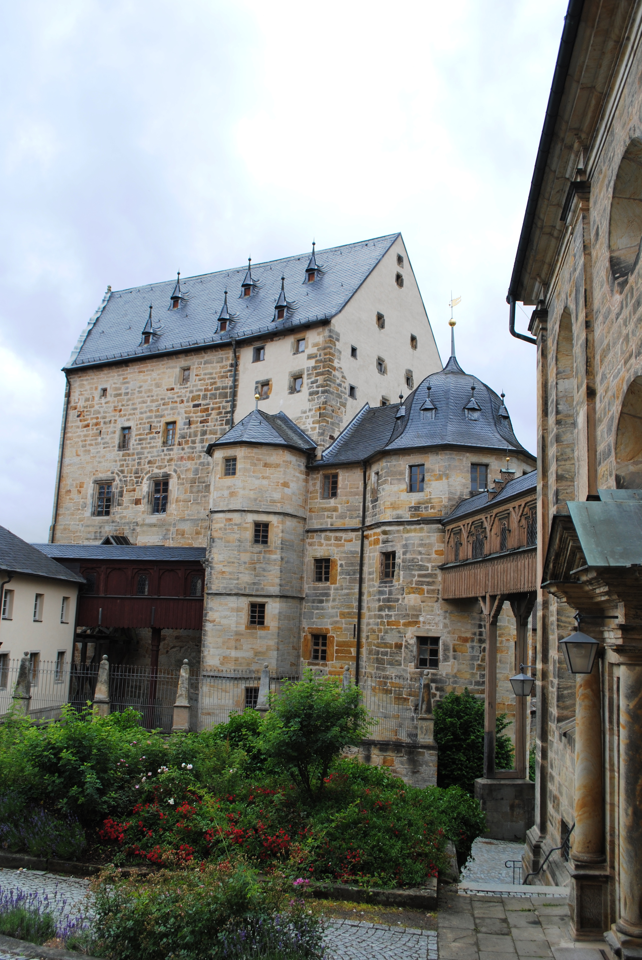 Kemenate, Verbindungsgang, Schloss Thurnau